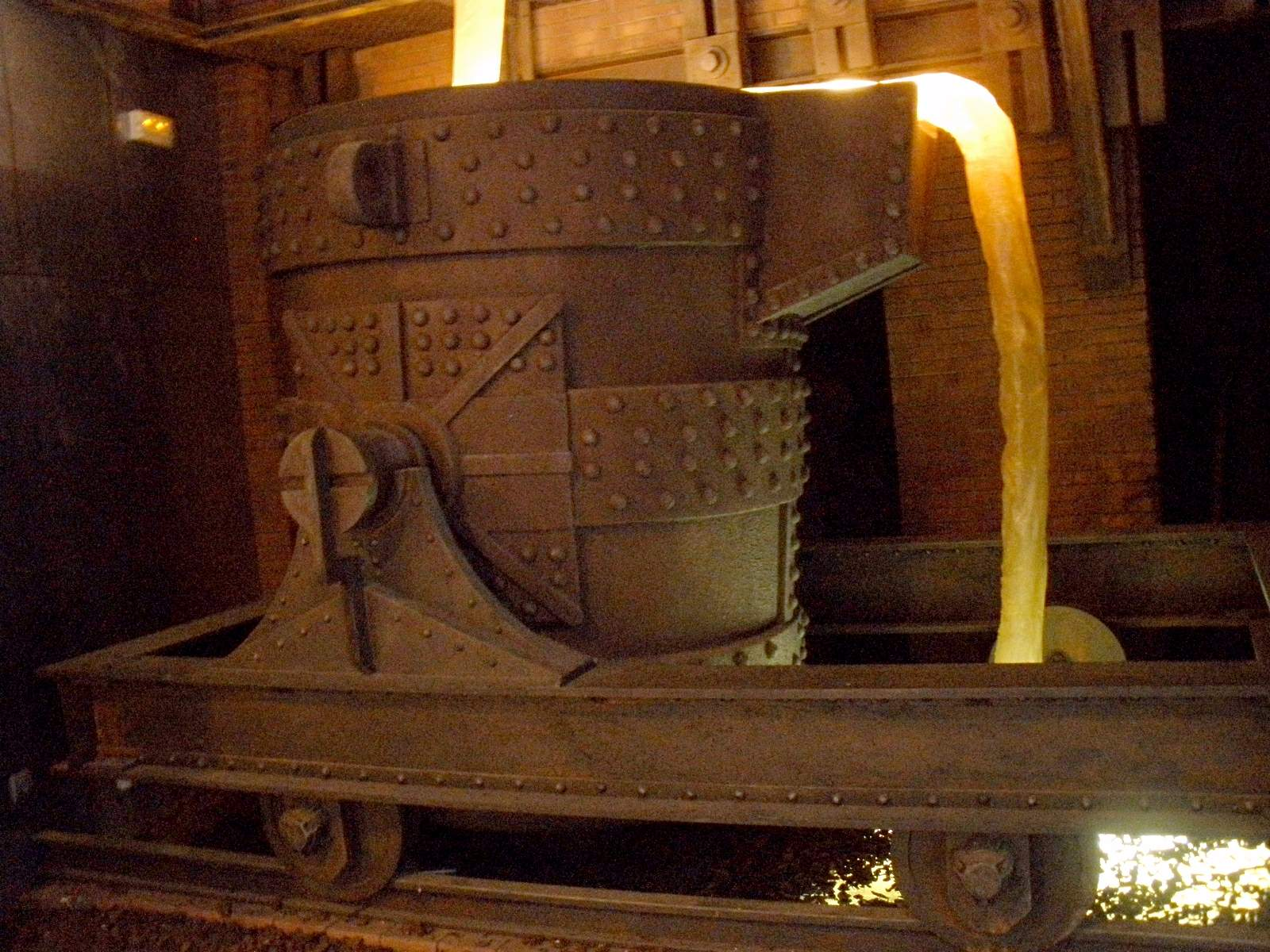 La Felguera (Langreo) - Museo de la Siderurgia de Asturias (MUSI)